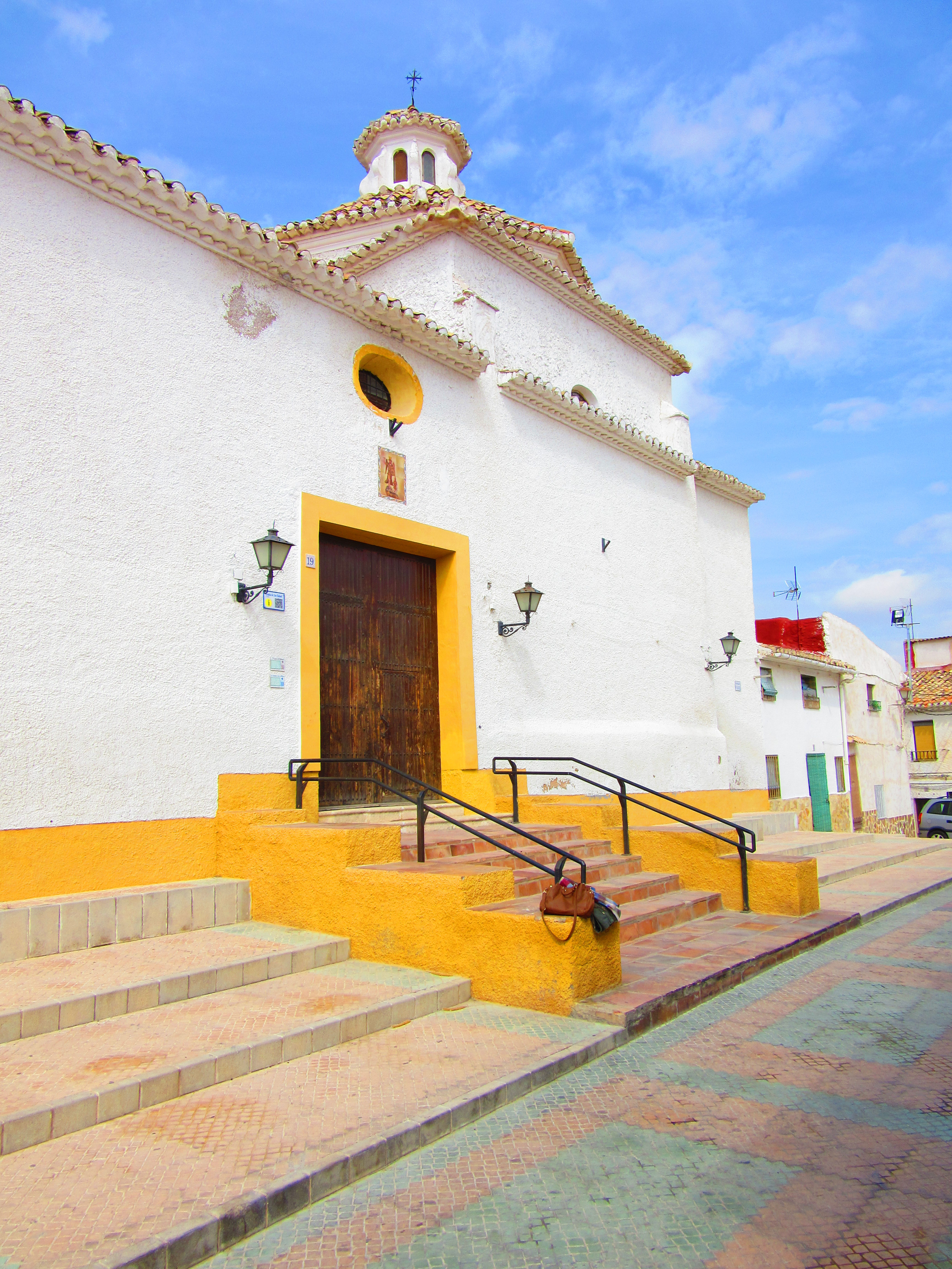 La Ermita